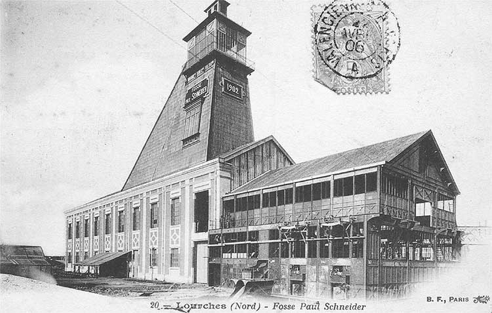 La fosse Schneider ou n° 5, anciennement Sainte-Barbe, de la Compagnie des mines de Douchy était un charbonnage constitué d'un seul puits situé à Lourches, Nord, Nord-Pas-de-Calais, France.